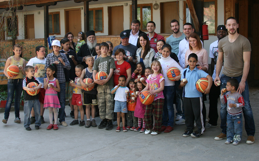 Благотворителна инициатива с БФБ